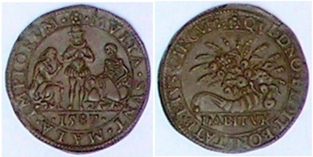 Rekenpenning Dordt 1587, honger in Artois. Foto van eigen exemplaar.